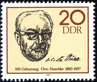 Otto Nuschke (1883–1957), homme politique allemand